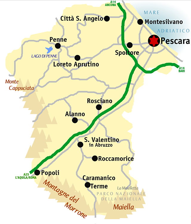 Provincie Pescara